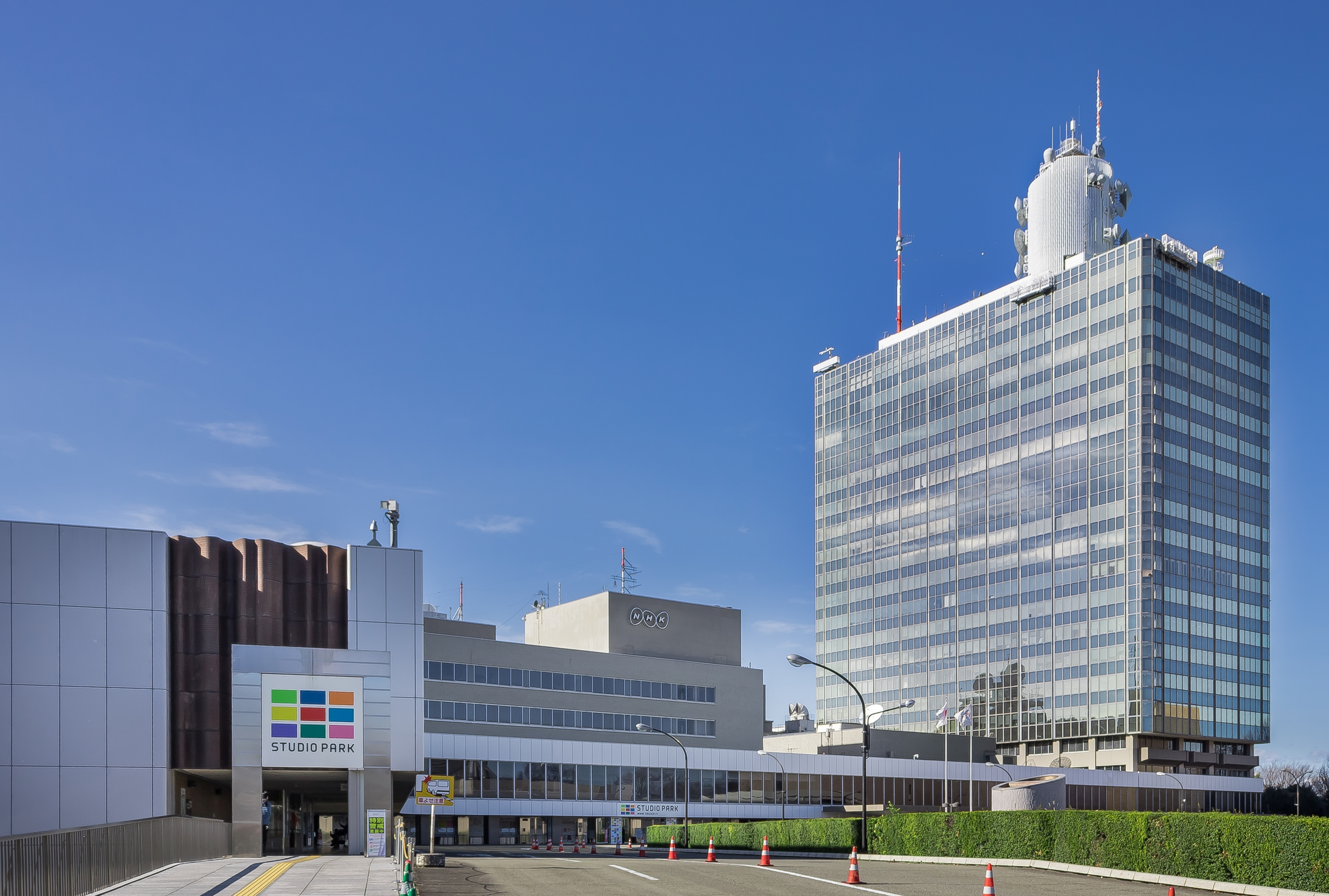 NHK放送センター(東京都渋谷区)